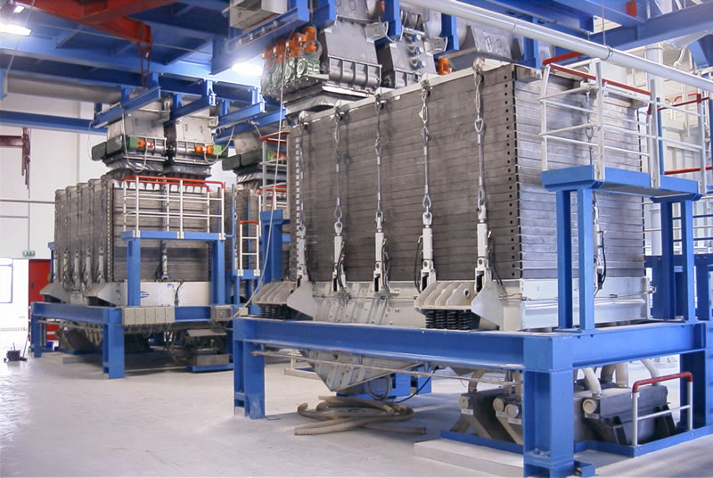 RHEWUM Mehrdecksieb MDS